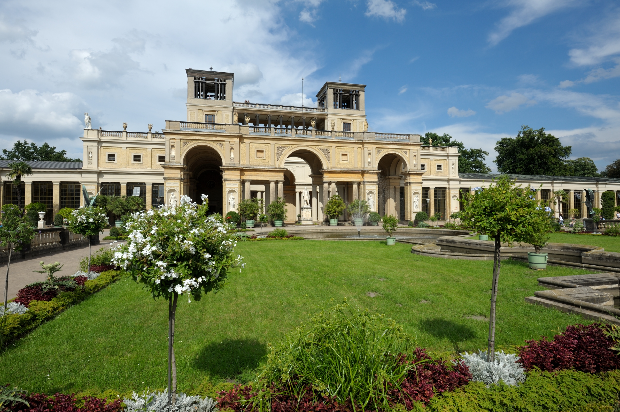 Orangerieschloss (Potsdam), Südseite des Mittelbaus im August 2010